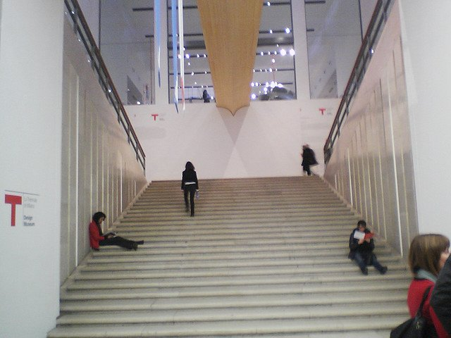 Triennale di Milano, main stair, Italy.